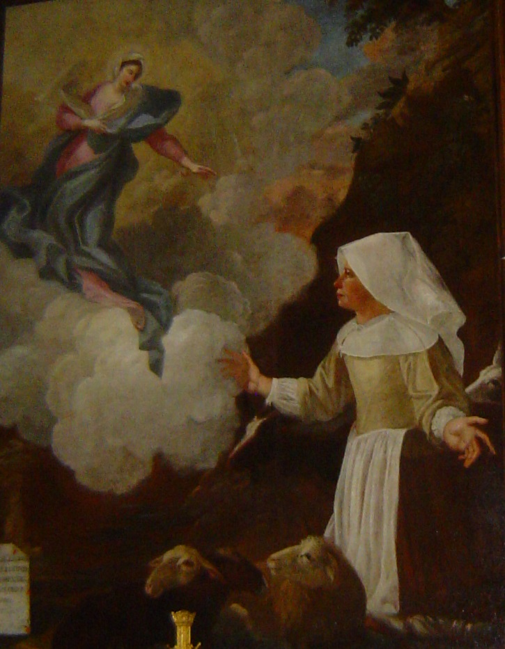 Benoîte Rencurel, témoin d'une apparition mariale. Tableau exposé au sanctuaire Notre-Dame du Laus.